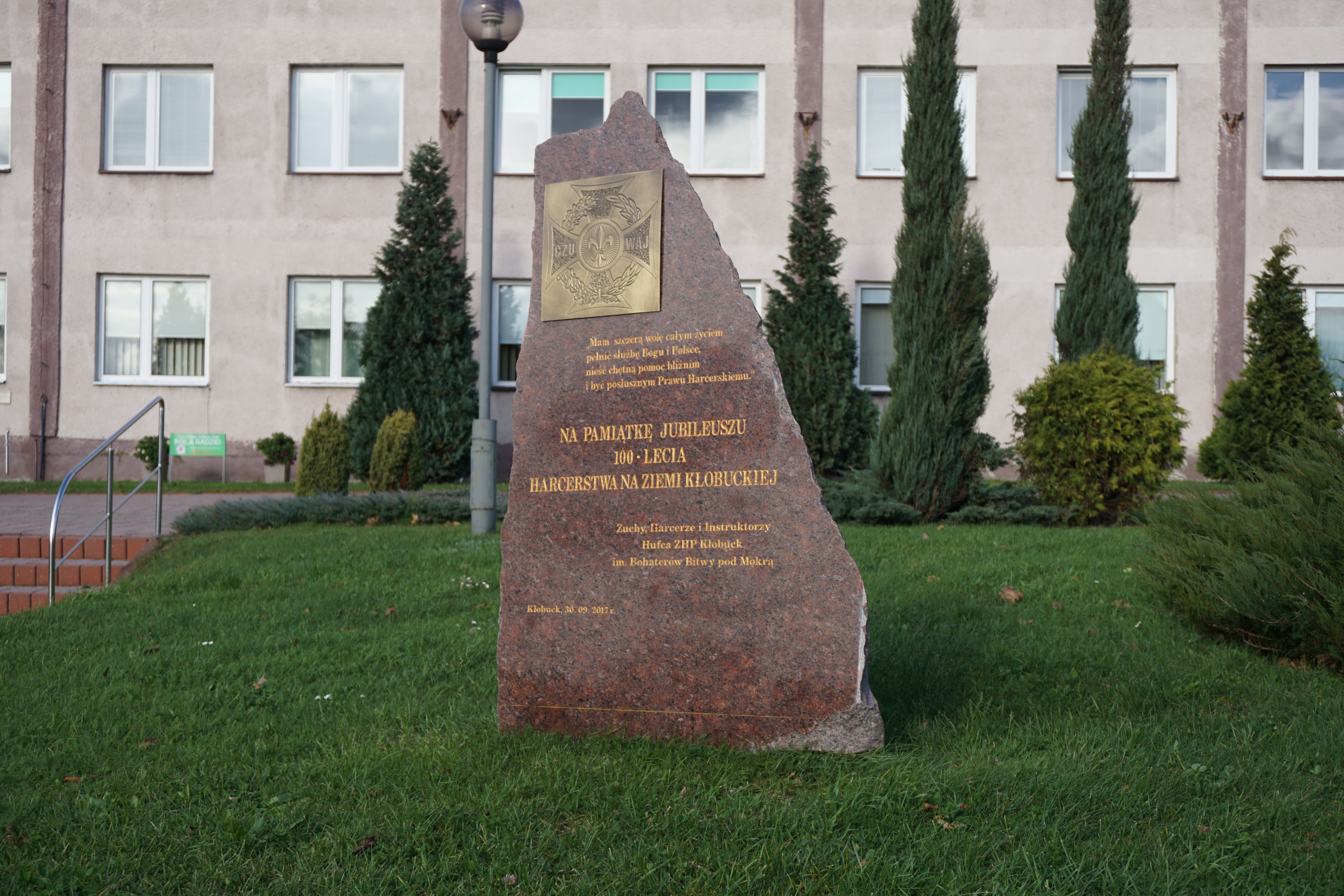 Głaz, ustawiony przed siedzibą starostwa powiatowego w Kłobucku, na pamiątkę jubileuszu stulecia harcerstwa na ziemi kłobuckiej.